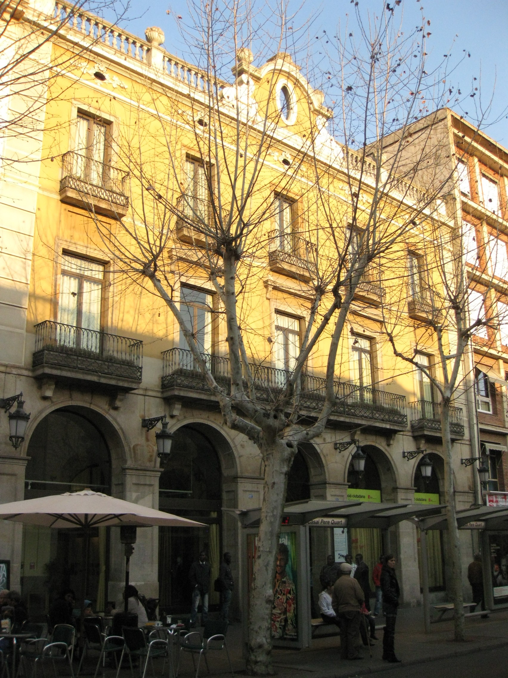 Pòrtics Oliver (Sabadell)